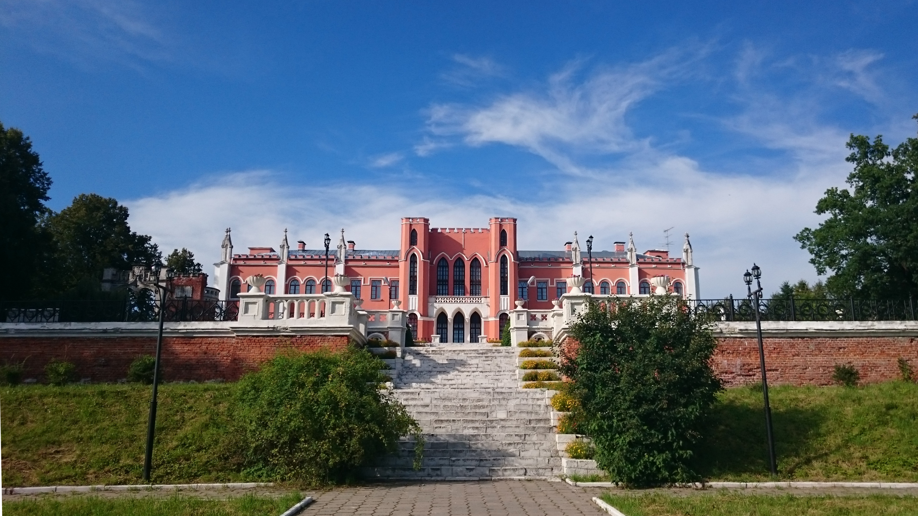 Усадьба «Марфино»: Марфино, Мытищинский район, Московская область